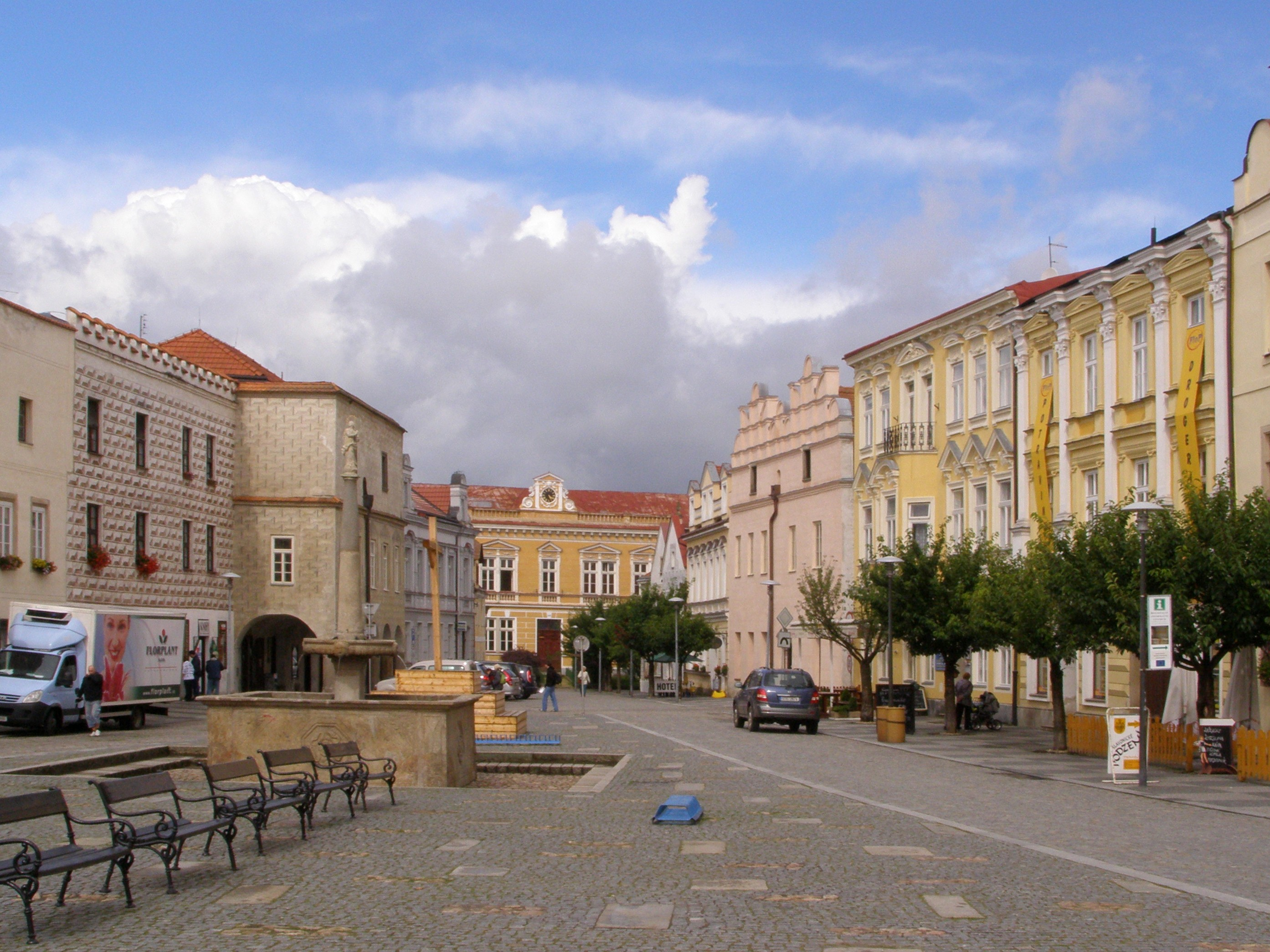 Slavonice, náměstí Míru, pohled na severozápadní stranu